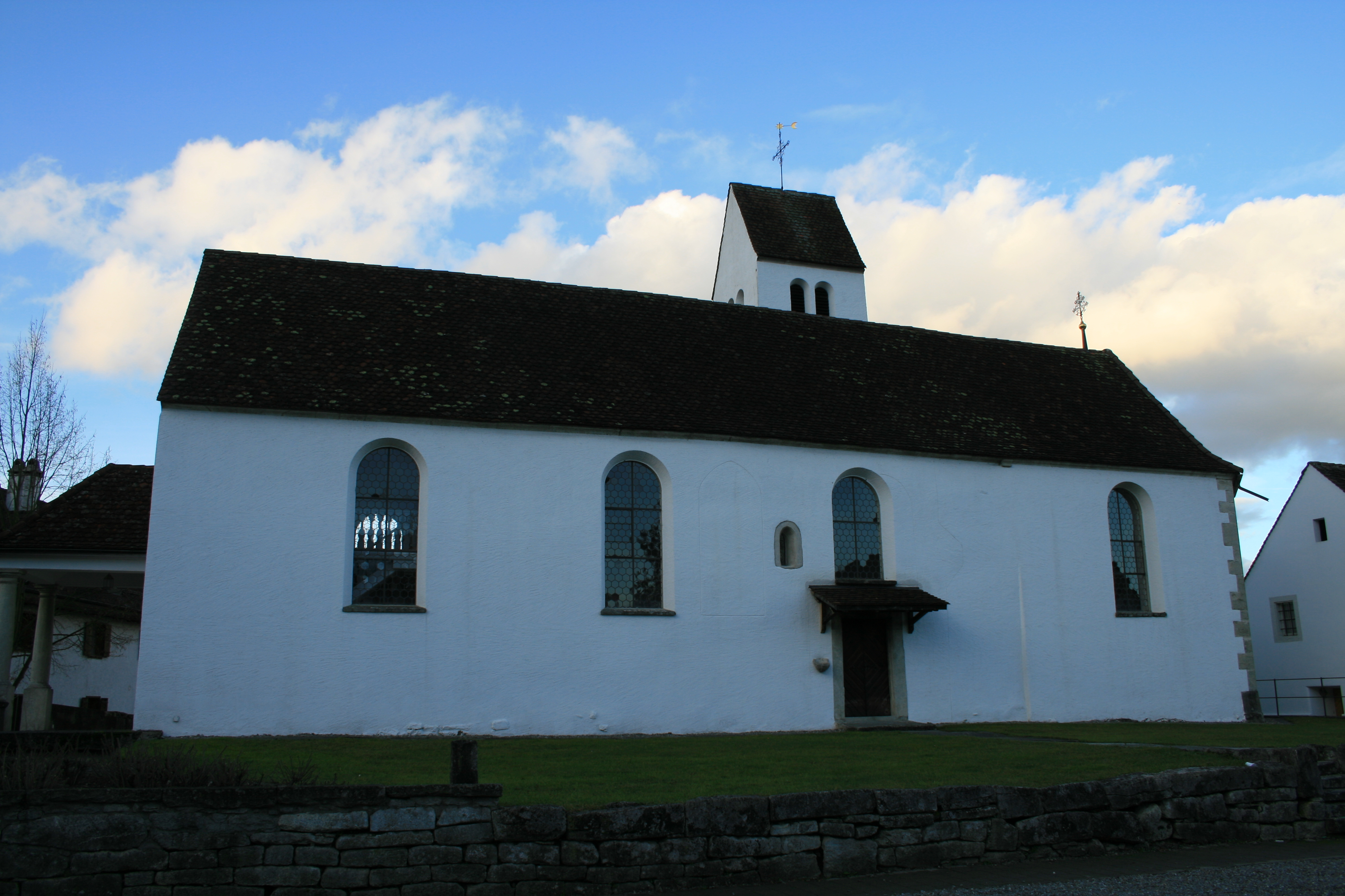 Alte Kirche Wohlenschwil